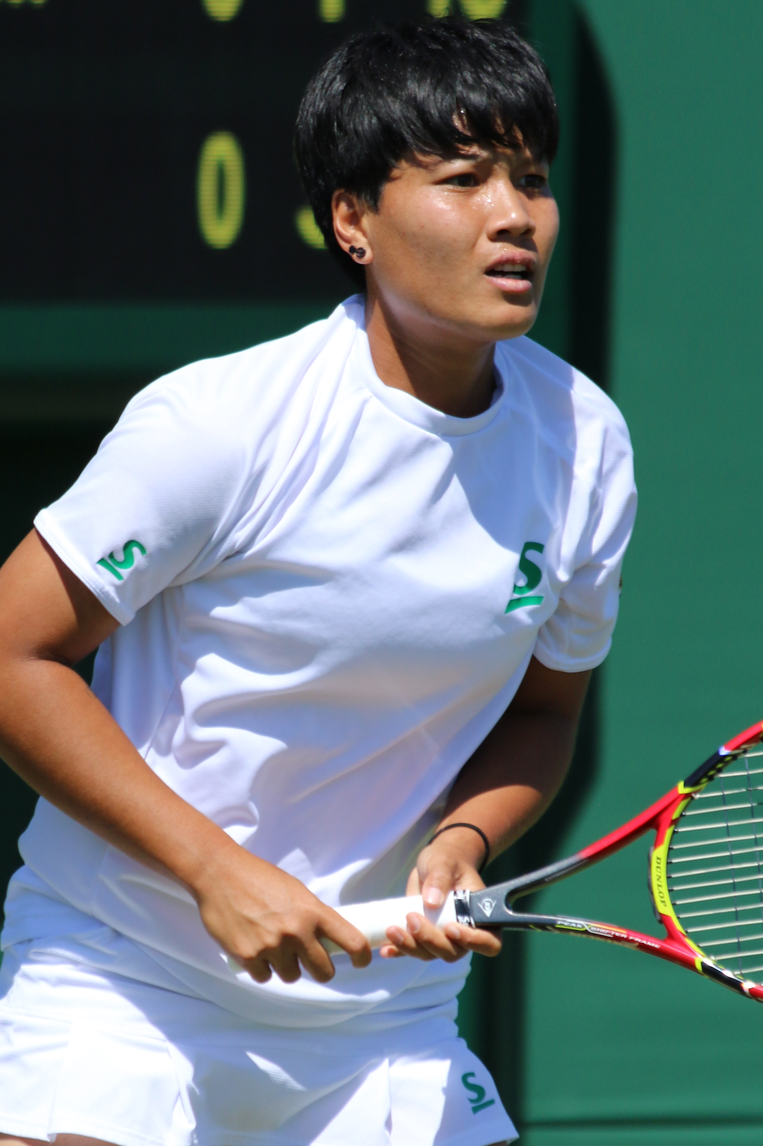 Kumkhum WM18 (30)